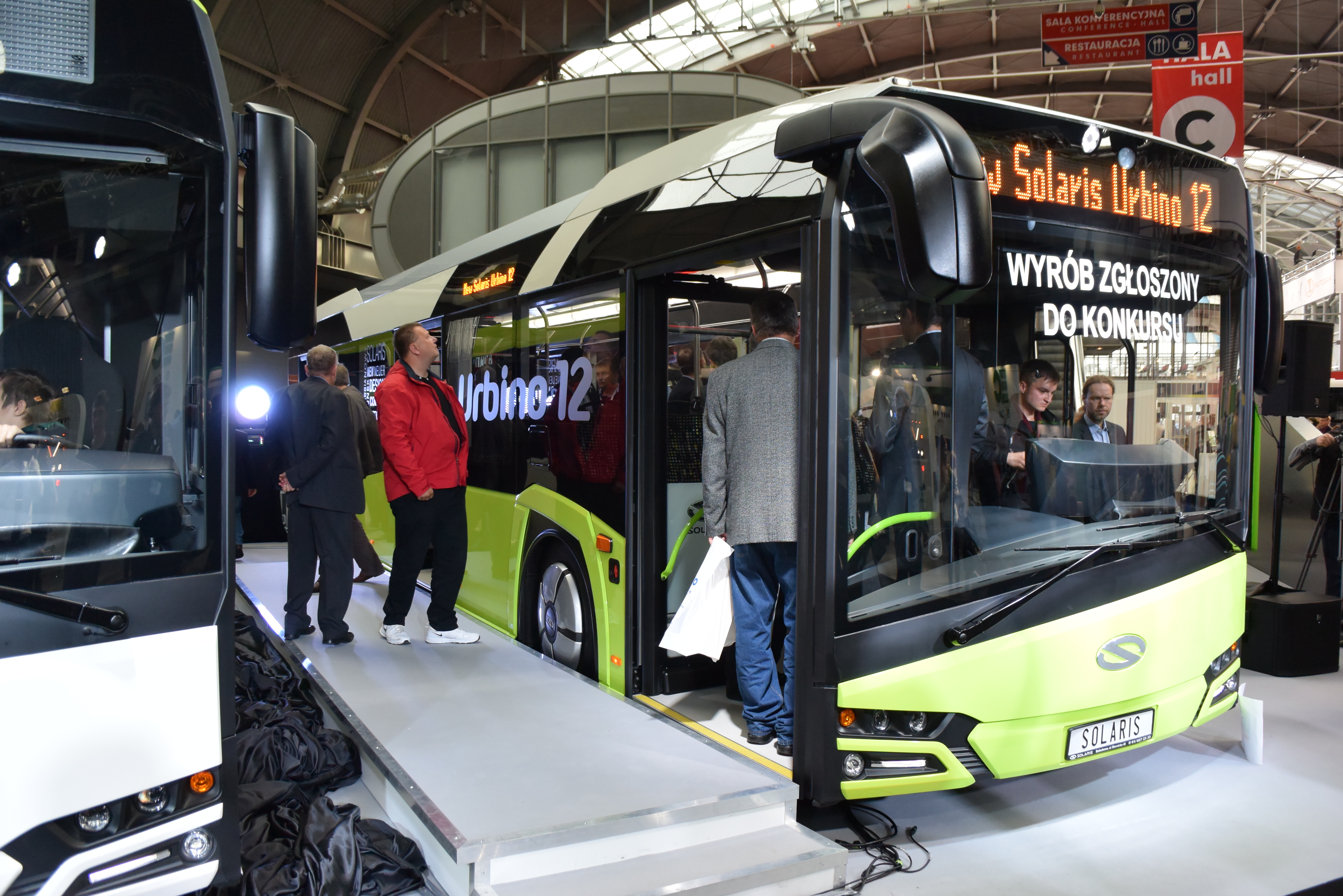 Polska premiera Nowego SOLARISa Urbino, Transexpo 2014, Kielce